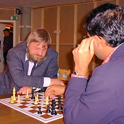 Artur Jussupow und Viswanathan Anand analysieren bei den Dortmunder Schachtagen 1997.